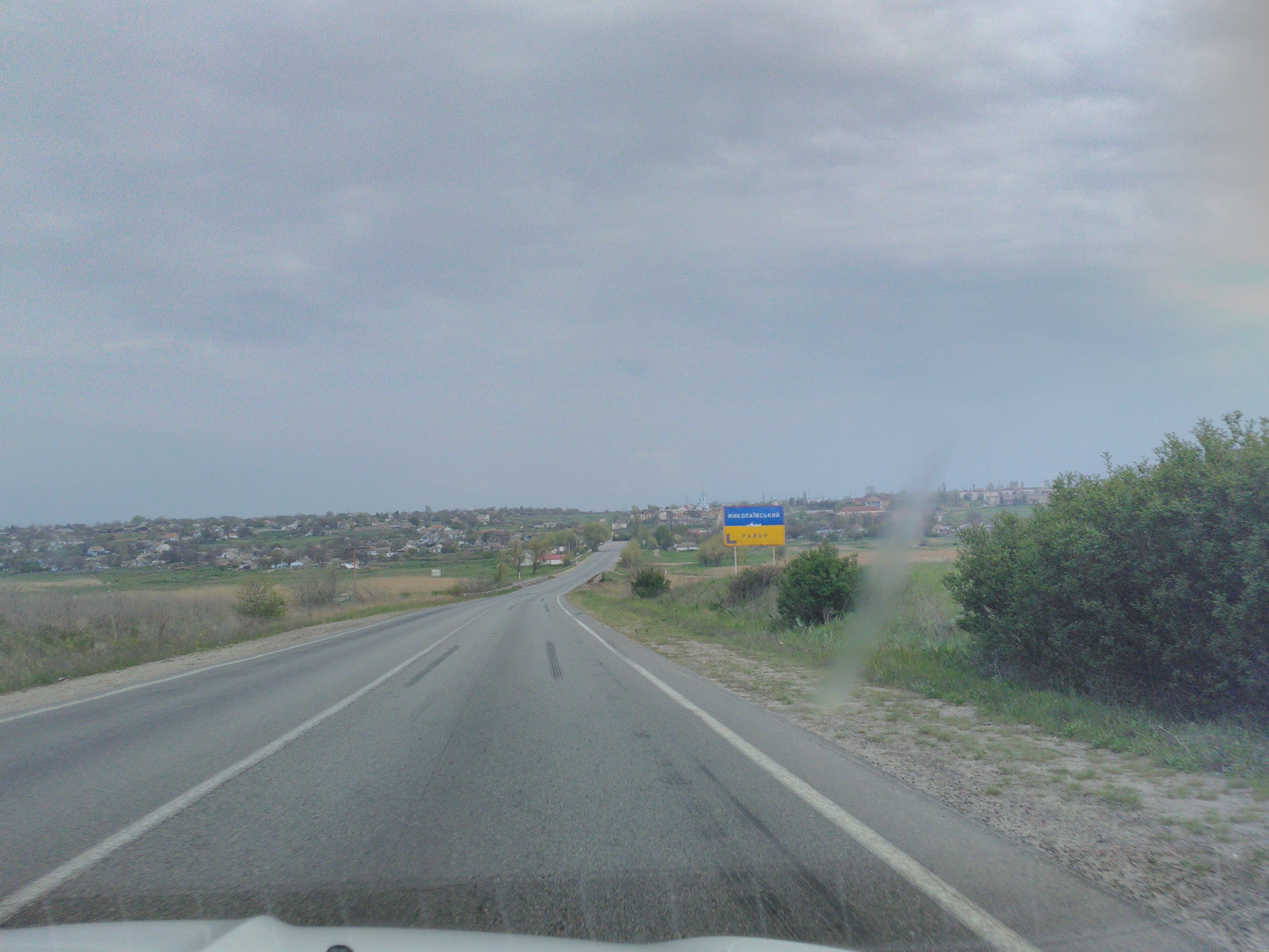 село Нечаяне, Миколаївський район, Миколаївська область